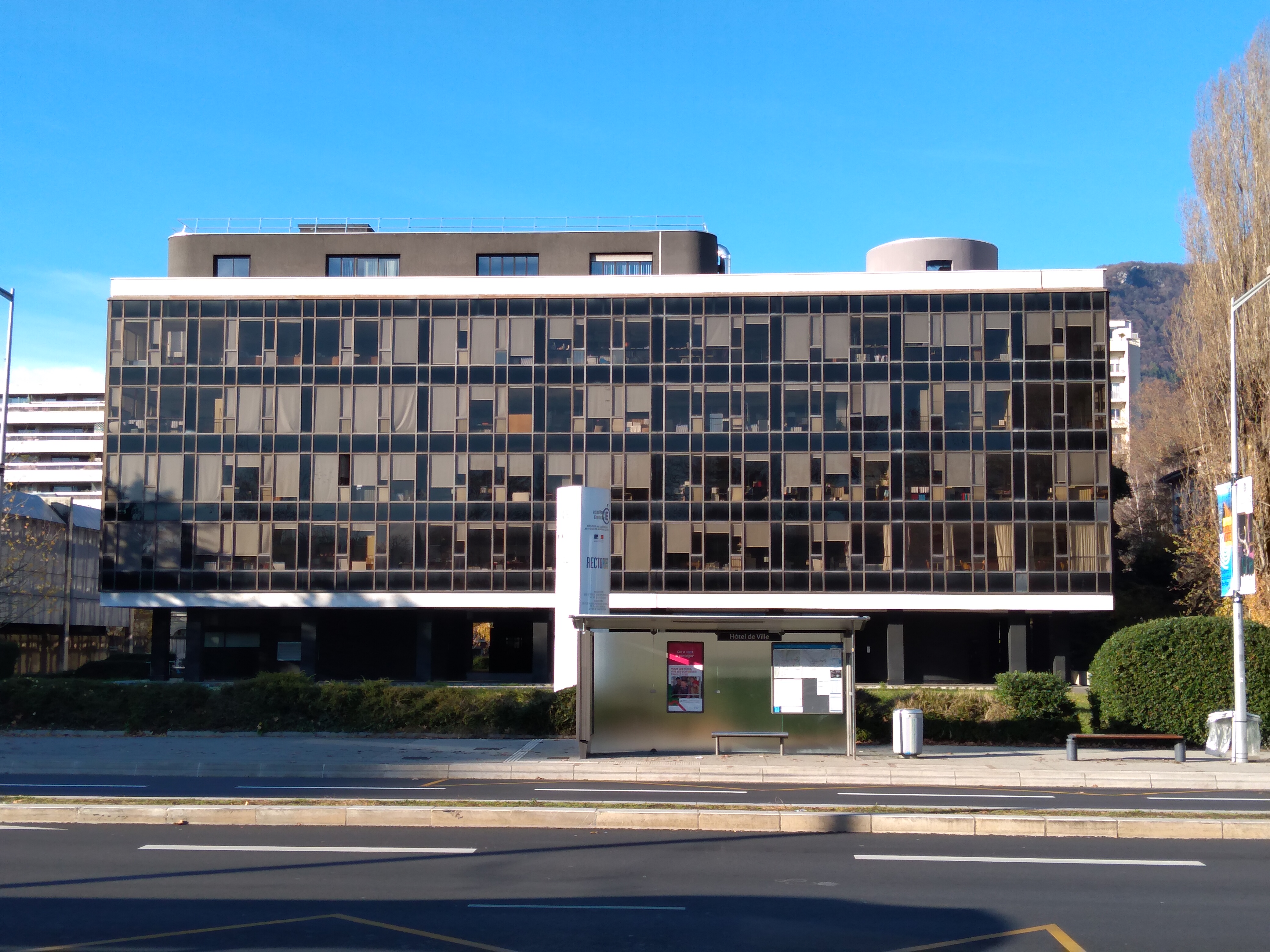 Le Rectorat de Grenoble (7 place Bir Hakeim, 38000 GRENOBLE) pris en photo depuis la station de tramway Hotel de Ville (ligne C) le 08 décembre 2019.